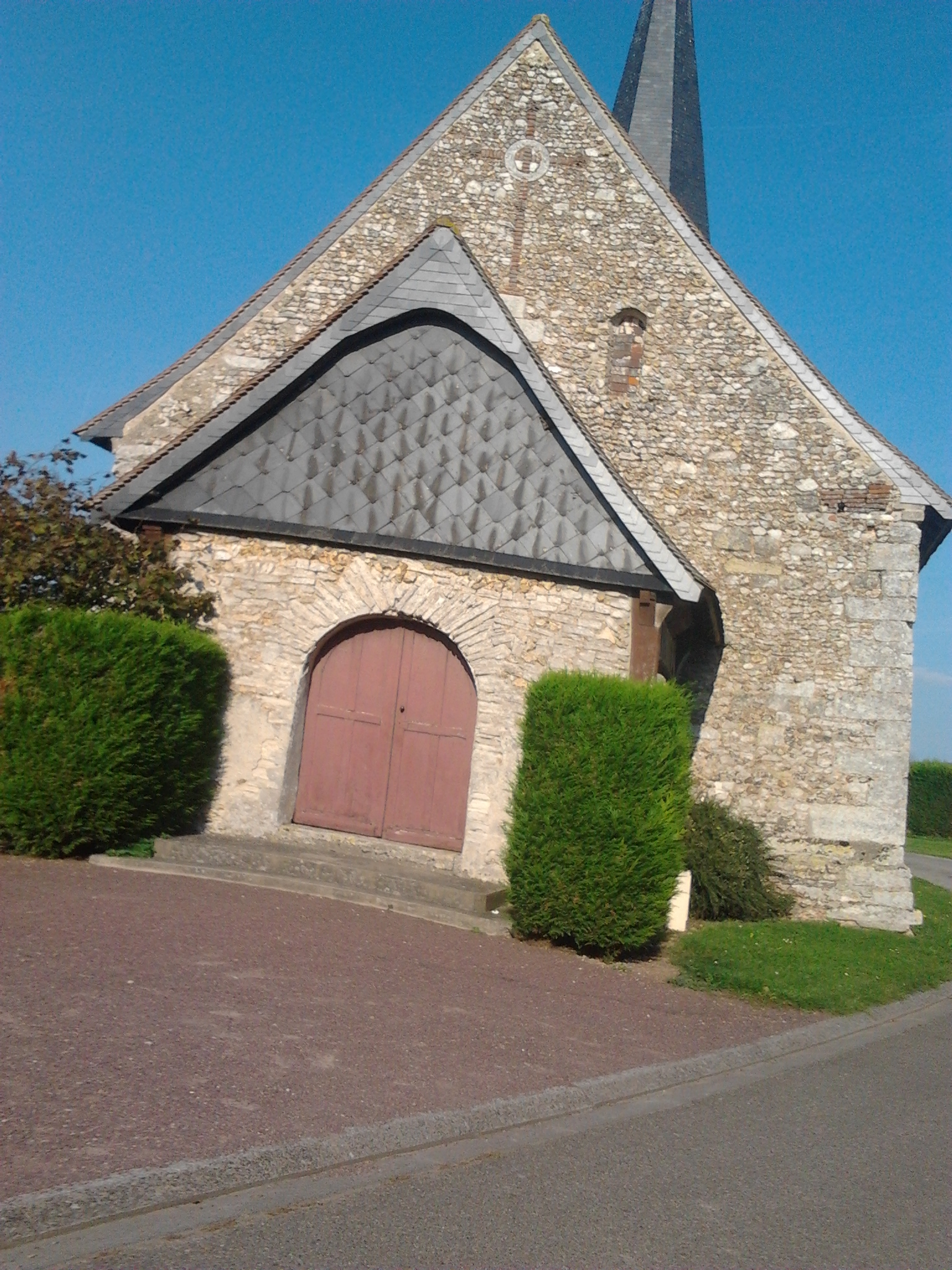 Eglise Saint Arnoult - Garencières_Eure